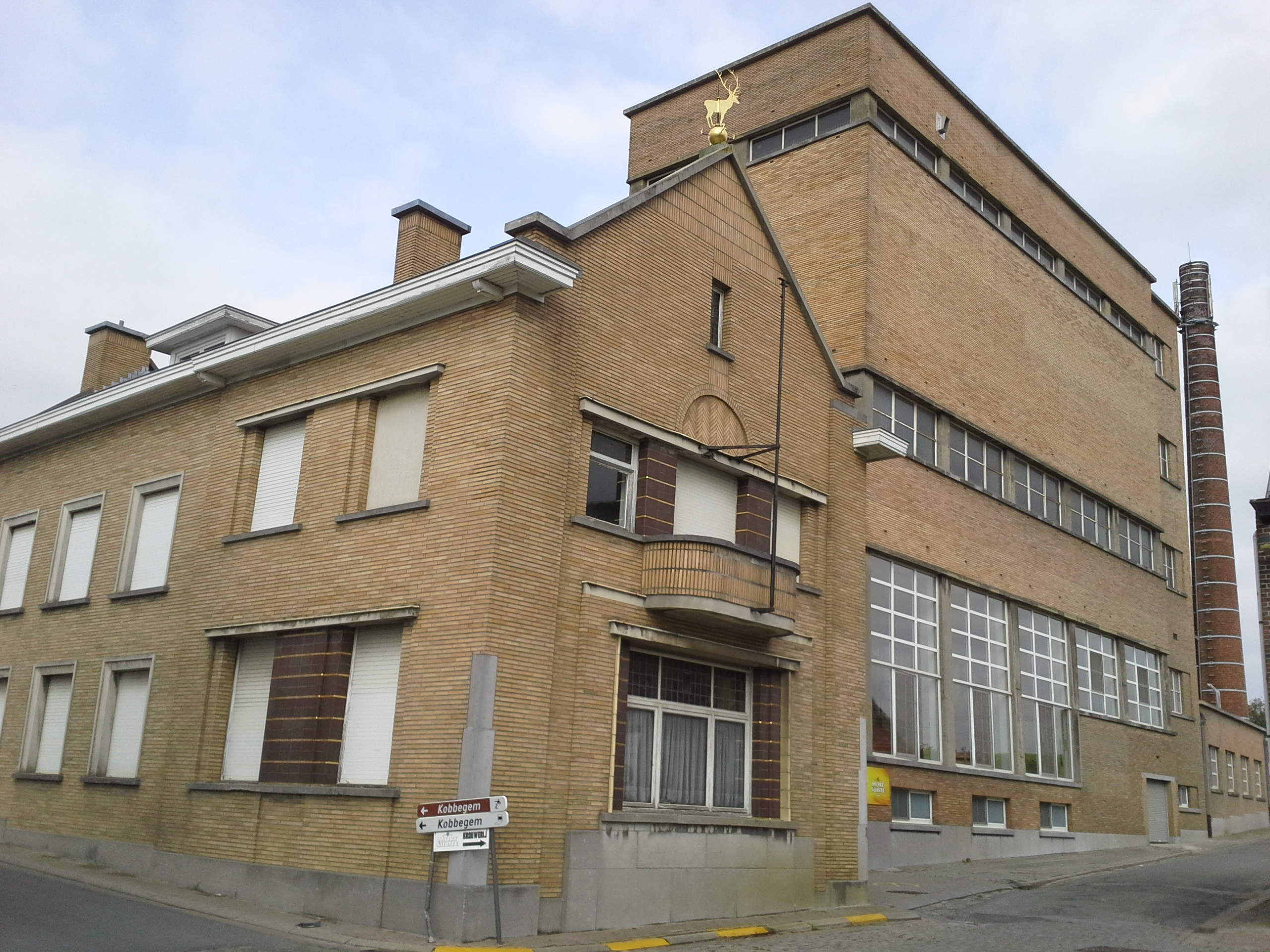 Brouwerij Den Hert Mort-Subite Lierput Kobbegem Belgium